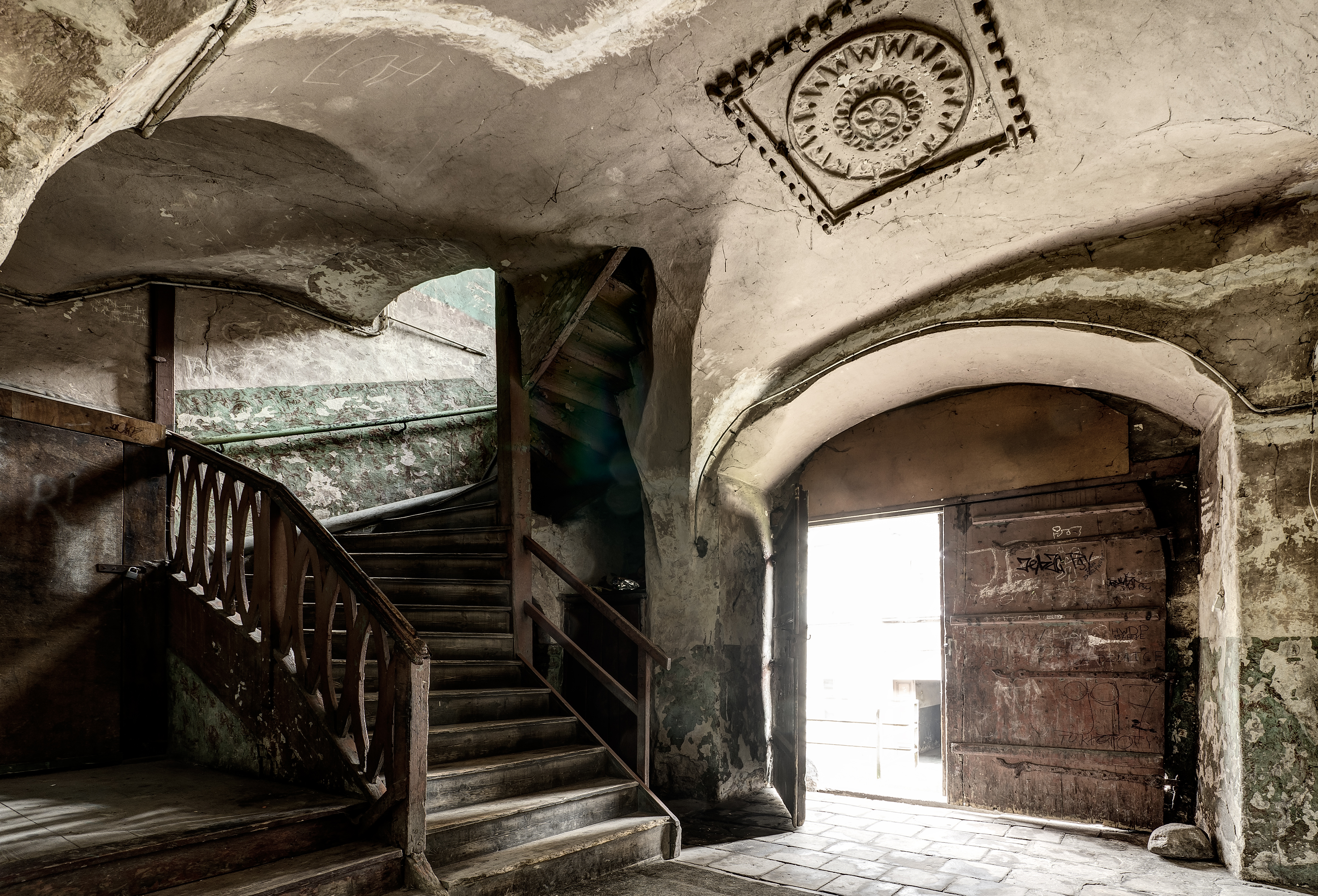 Nowa Ruda, dom ul. Kościelna 12